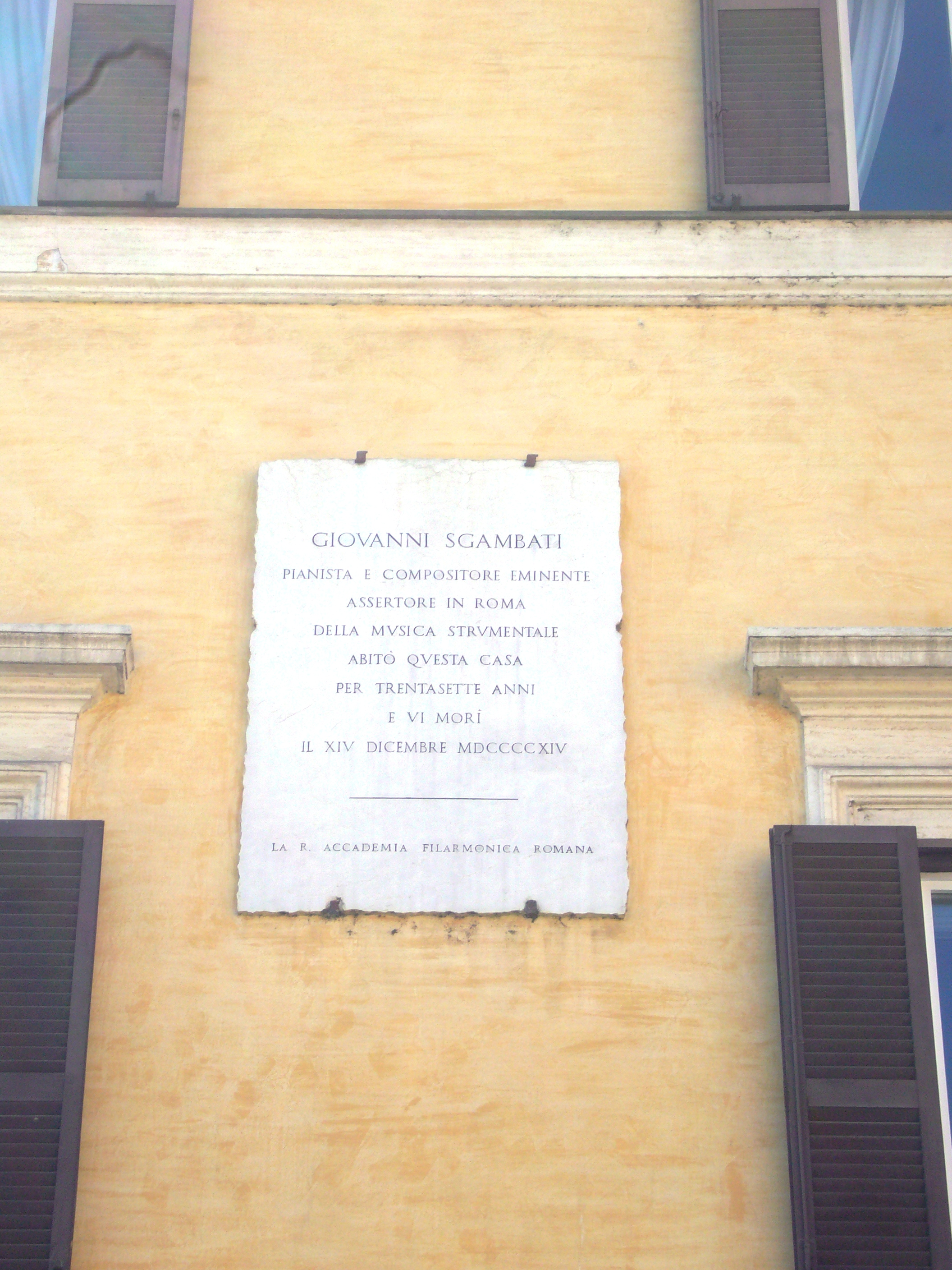 Roma, piazza di Spagna 93. Memoria di Giovanni Sgambati sulla casa in cui abitò.